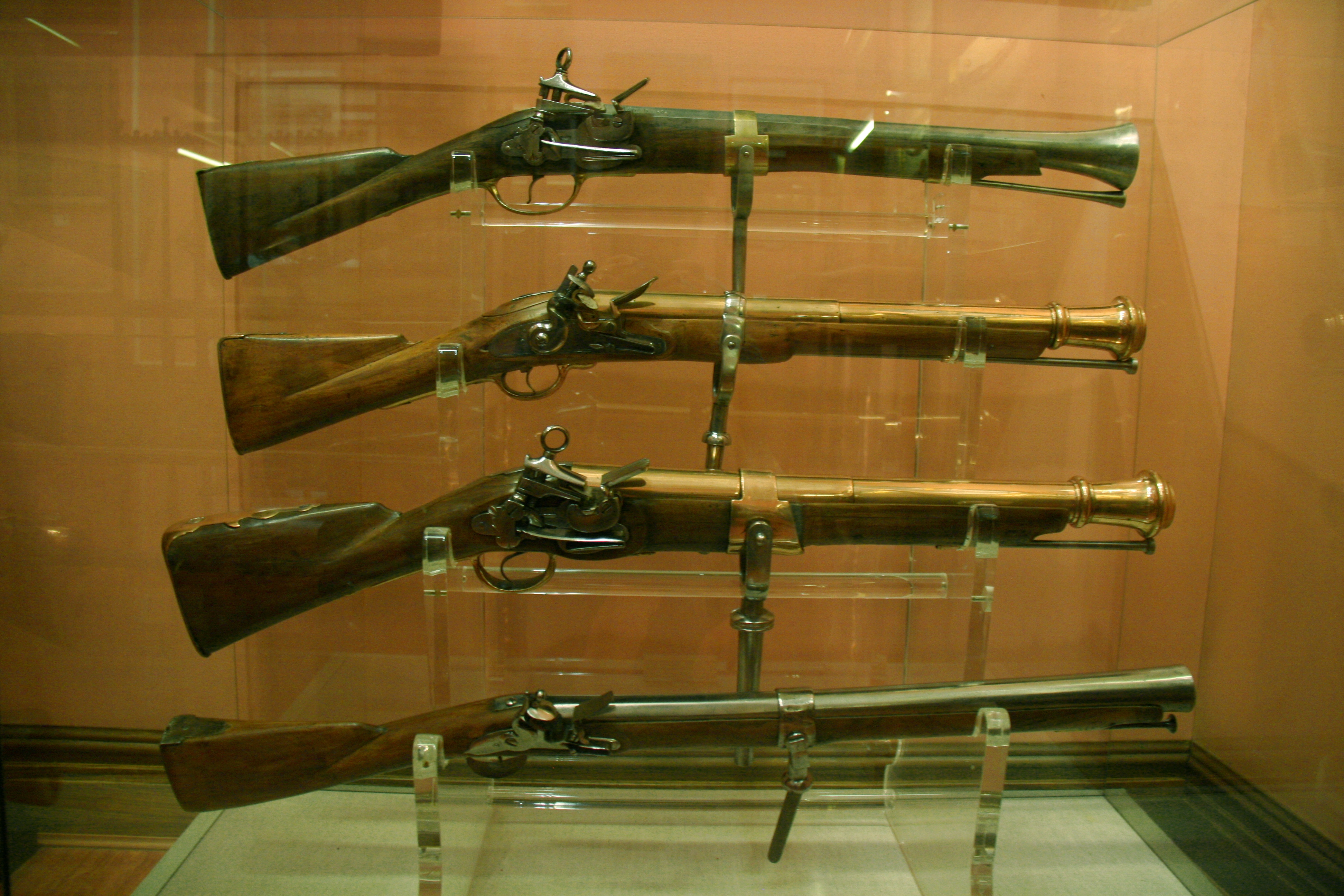 Trabucos de borda, se montaban en las bordas de los buques